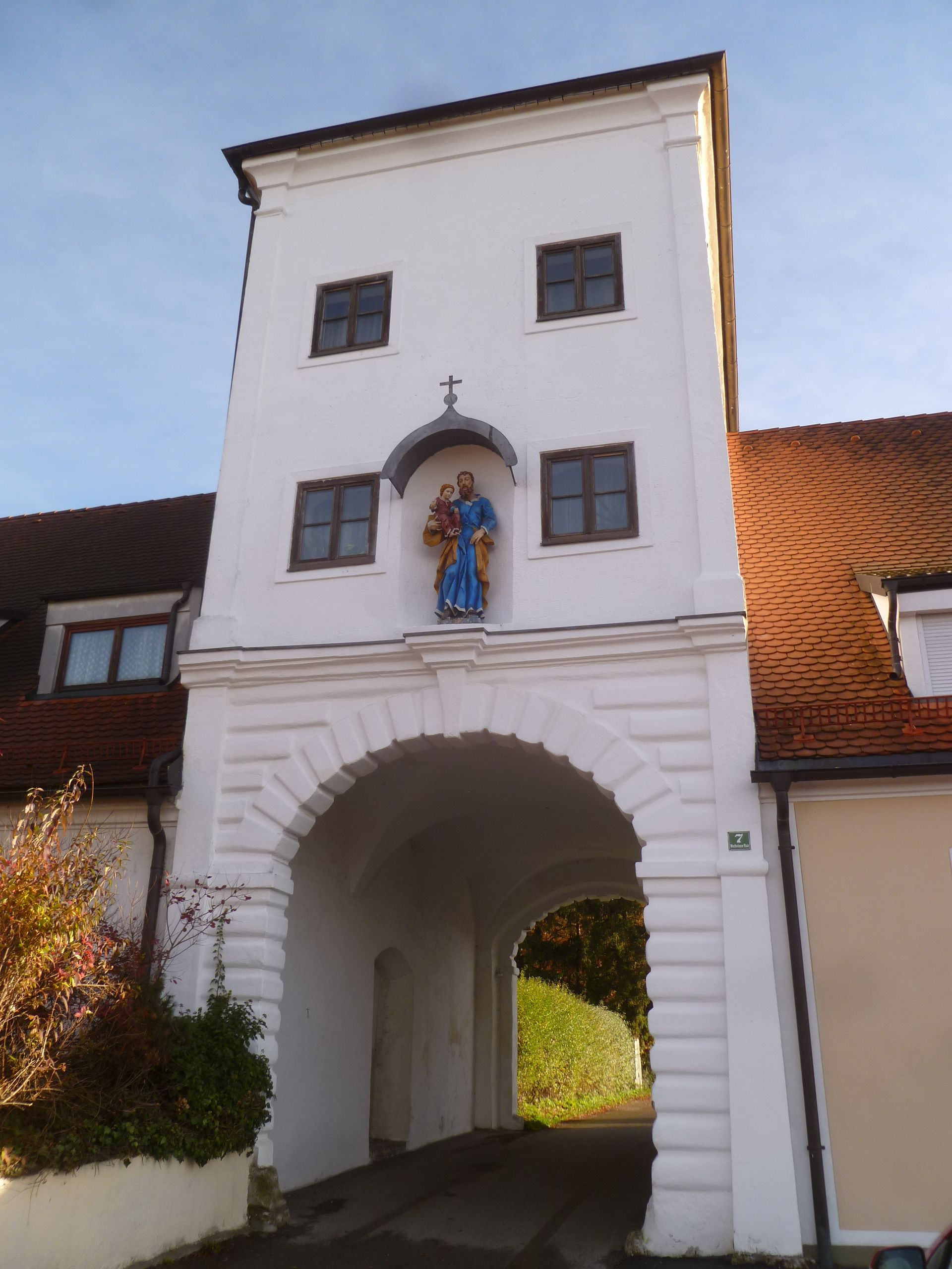 Gesamtanlage des ehem. Augustiner-Chorherrenklosters Ranshofen: Pfarrkirche (Stiftskirche), "Schlössl" (Klostertrakte), Meierhof, Friedhof mit Karner, Einfriedungsmauern mit Portalanlagen, Gartenbaudenkmale im ehem. Konventgarten; Reste von Vorgängerbauten